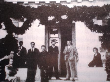 Jonavos arklių pašto stotis (dabar Jonavos krašto muziejus). Muziejus įsikūręs buvusios Jonavos arklių pašto stoties pastate.